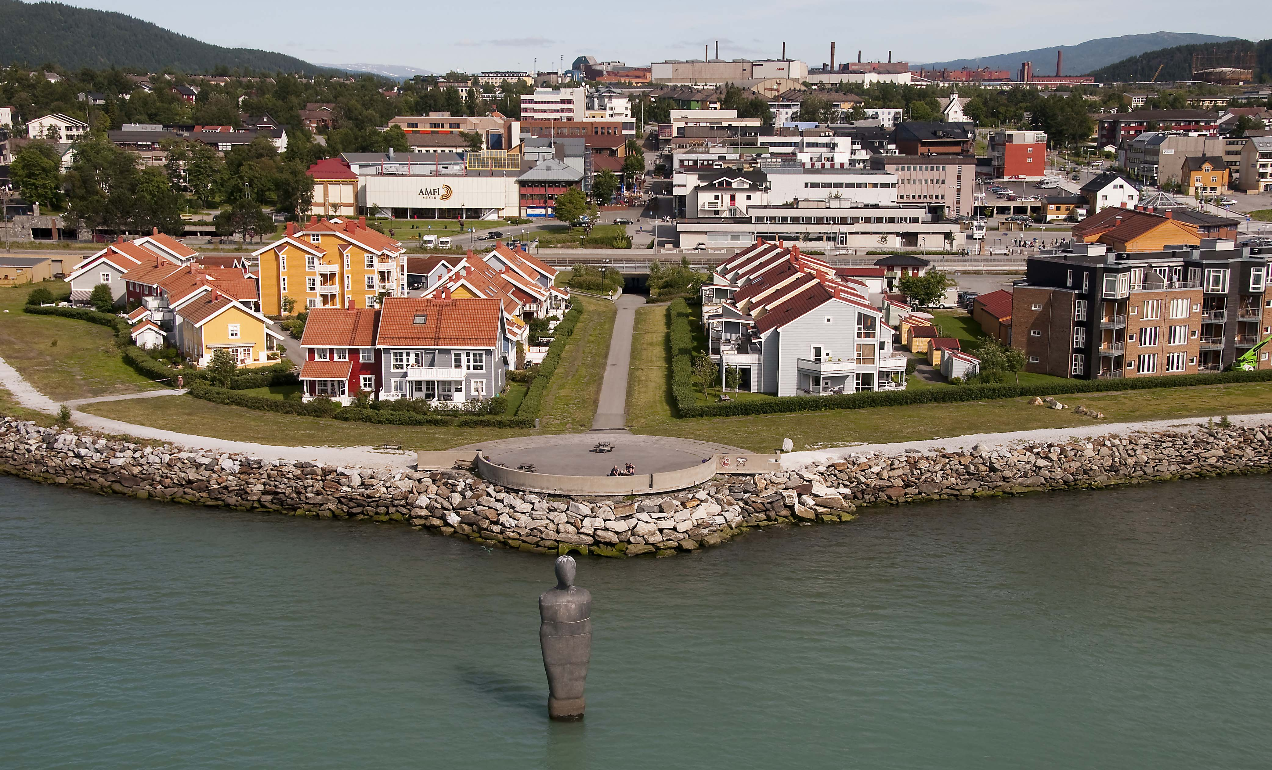 Mo i Rana med Havmannen i front